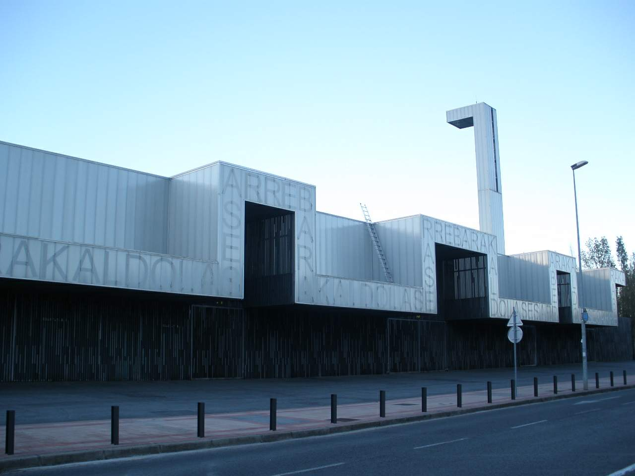 Estadio de Lasesarre (Barakaldo)